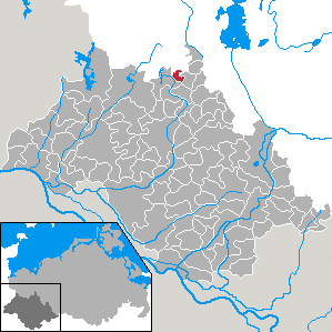 Zülow in Mecklenburg-Vorpommern - district Ludwigslust